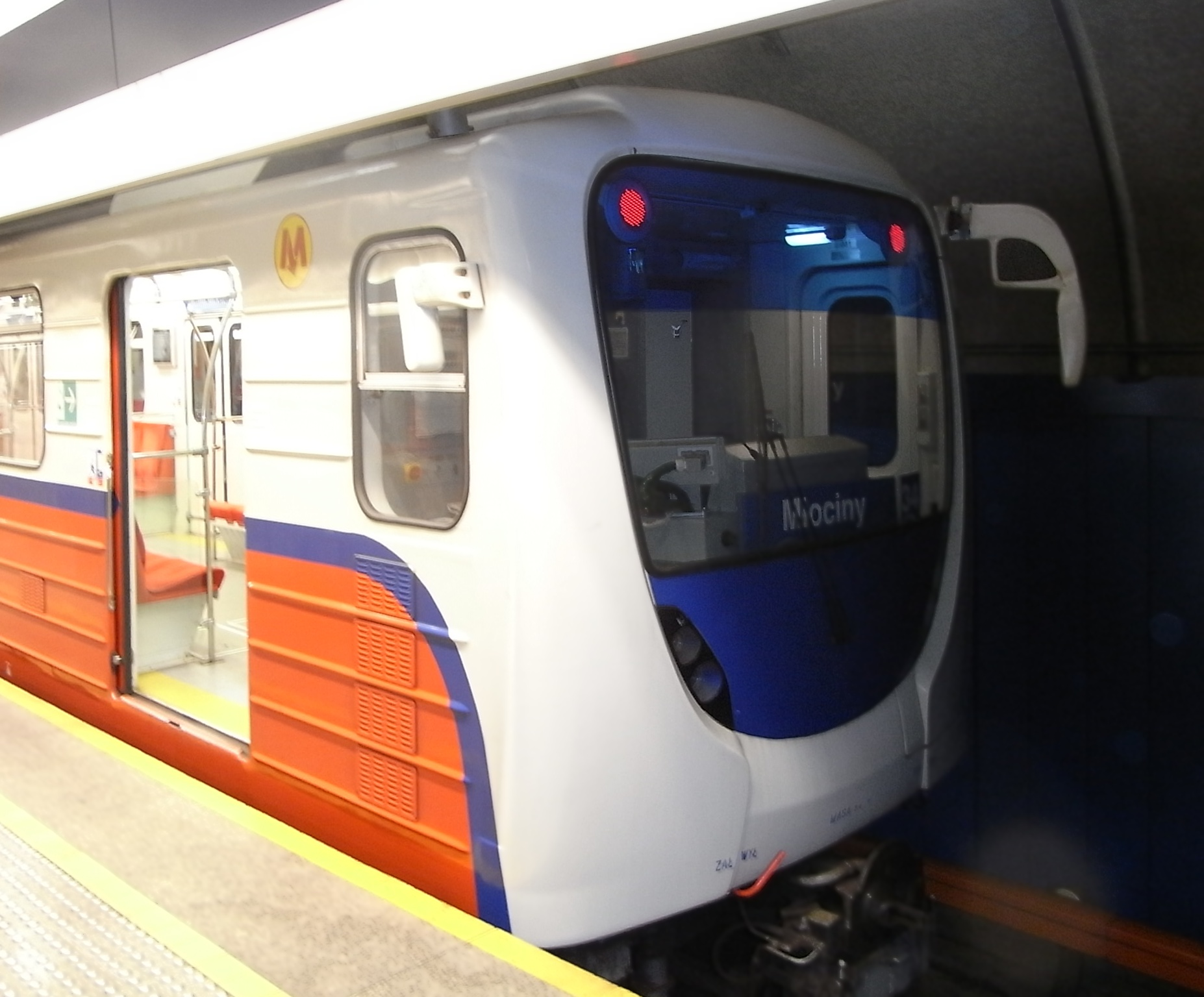 Rückseite eines Zugs der Warschauer U-Bahn